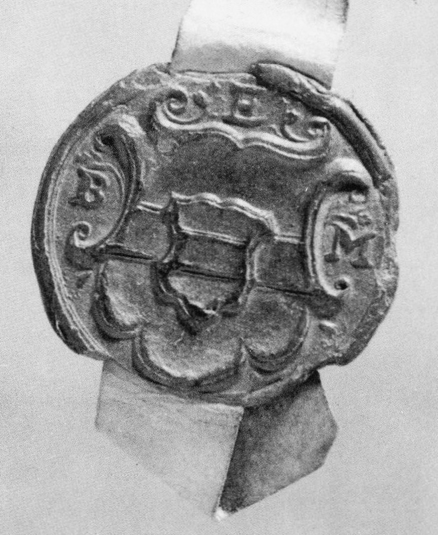 Siegel des Bischofs Bernhard von Raesfeld, Fürstbischof zu Münster (* 1508; + 1574; reg. 1557-1566)